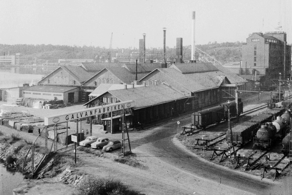 Stockholms Galvanfabriken, Marievik, Liljeholmen. Ursprungligen en del av SJ:s verkstäder.